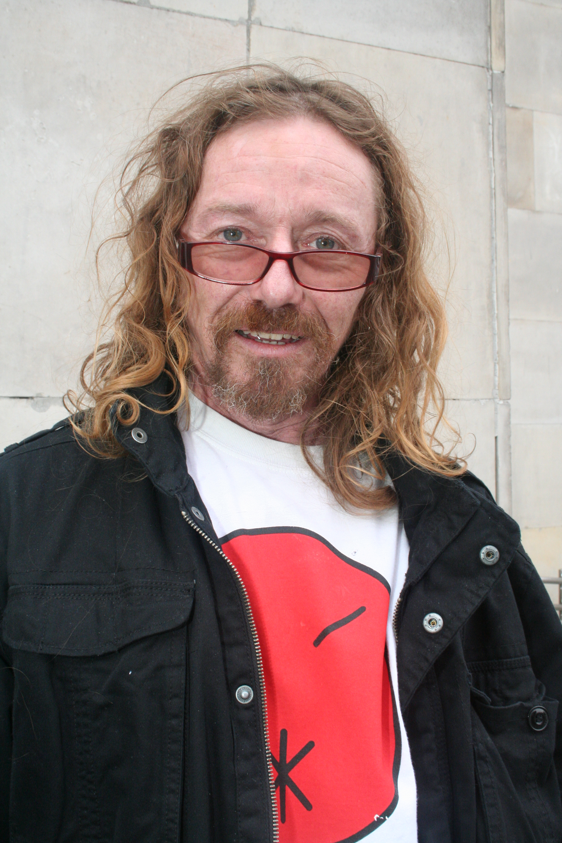 Glenn Fabry podczas 23. Międzynarodowego Festiwalu Komiksu w Łodzi